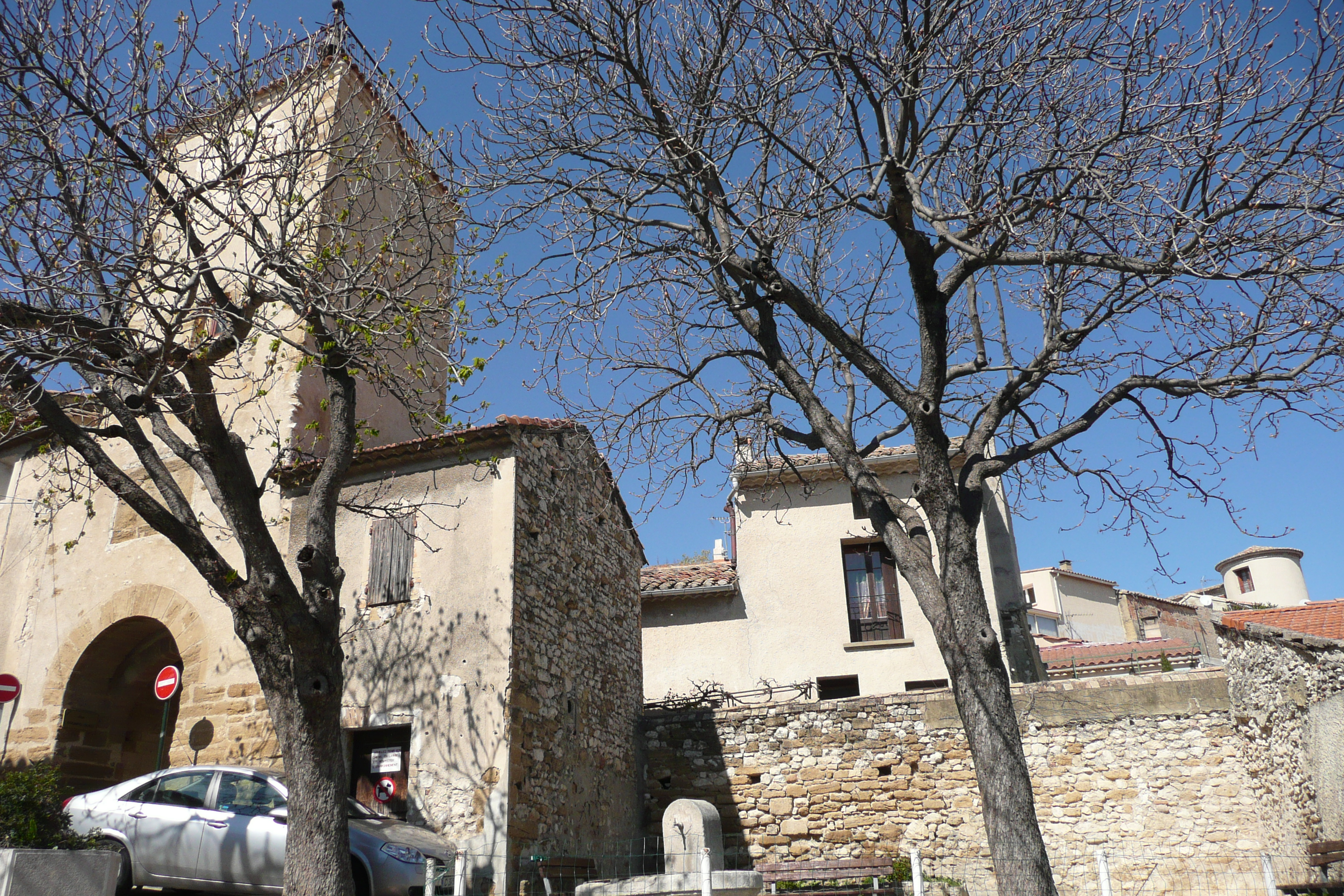 Vedène.